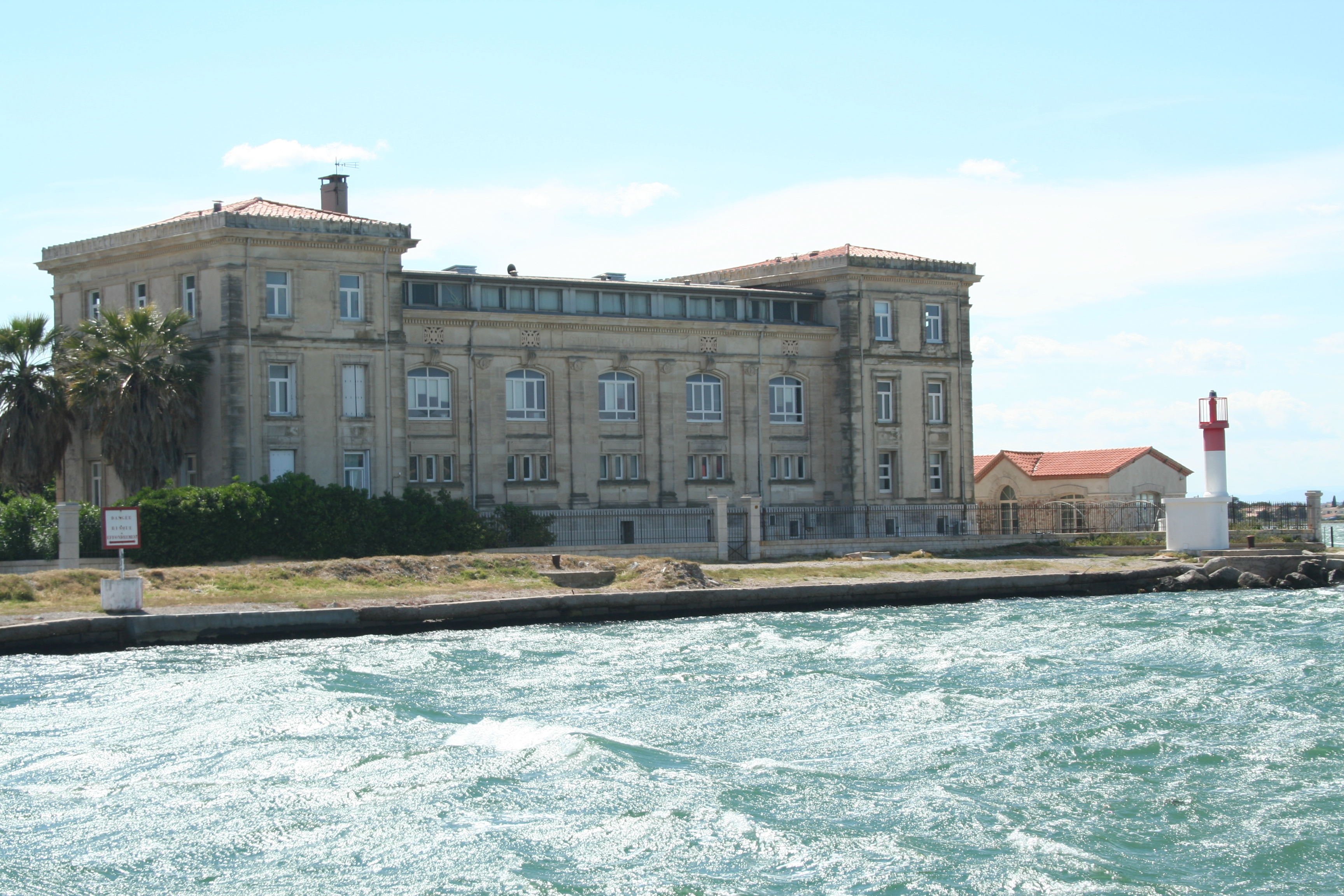 Sète (Hérault) - Station de biologie marine, Université Montpellier II, vu depuis la Pointe-Courte.